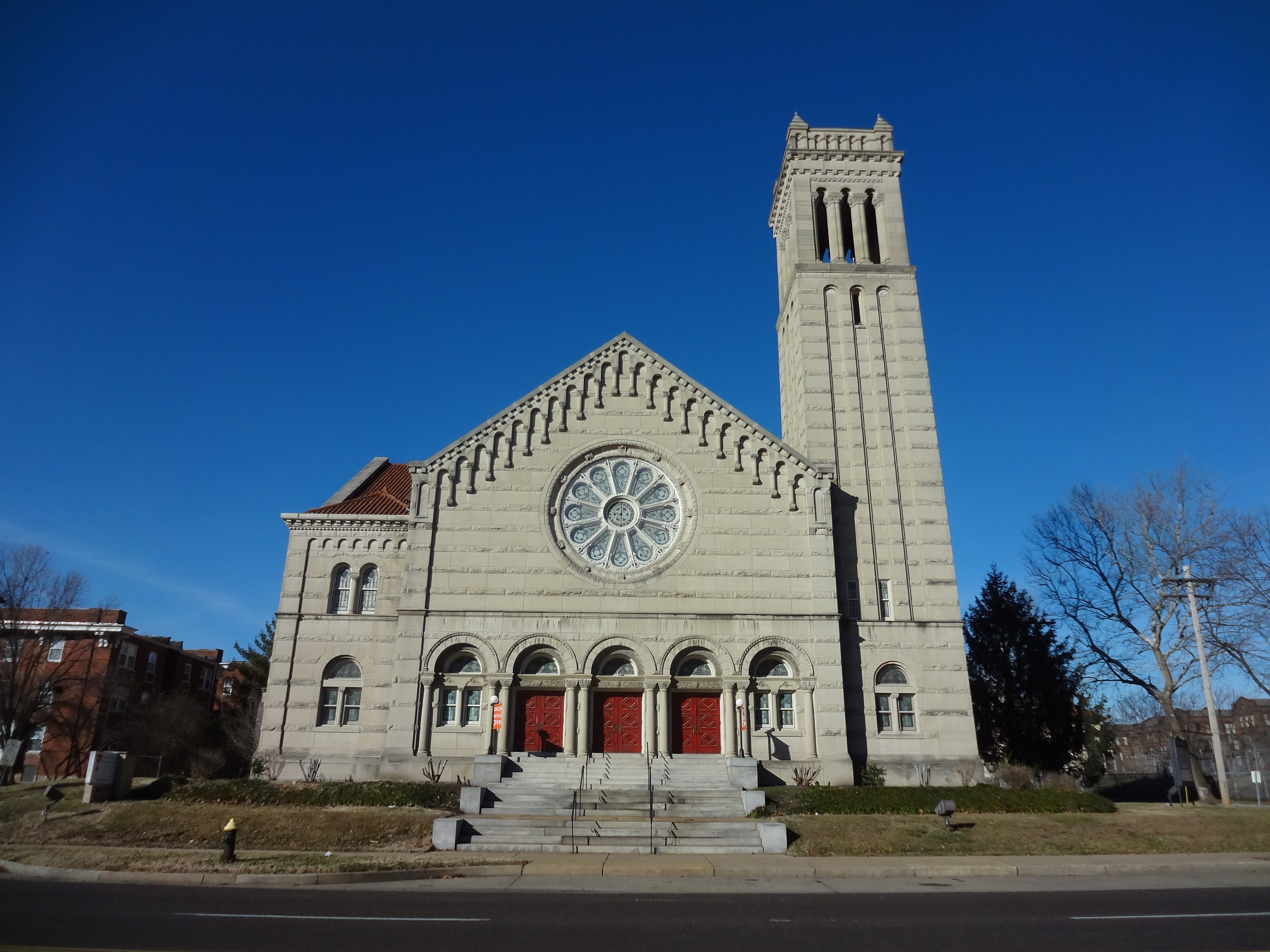 Union Avenue Opera